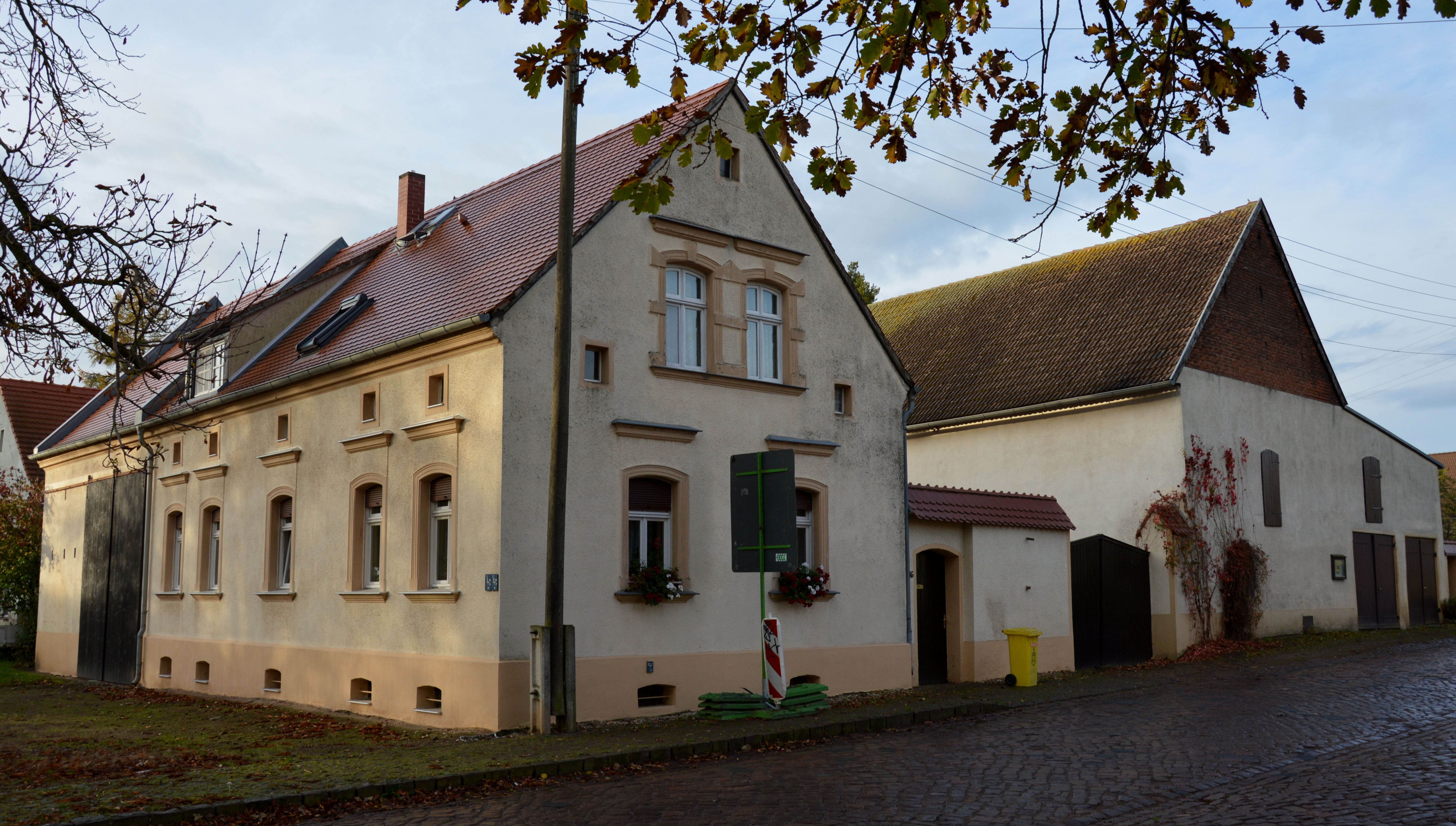 Haus Anger 16 in Kaltenmark